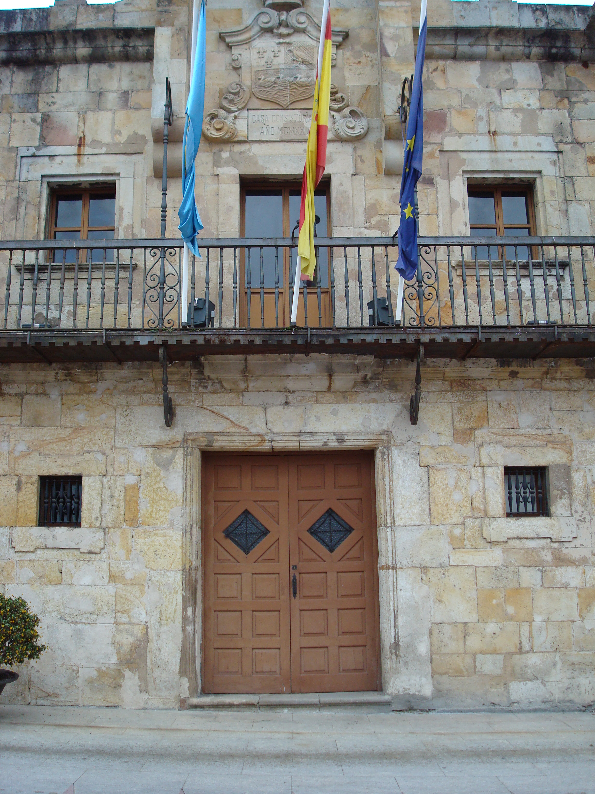 Colunga - 004